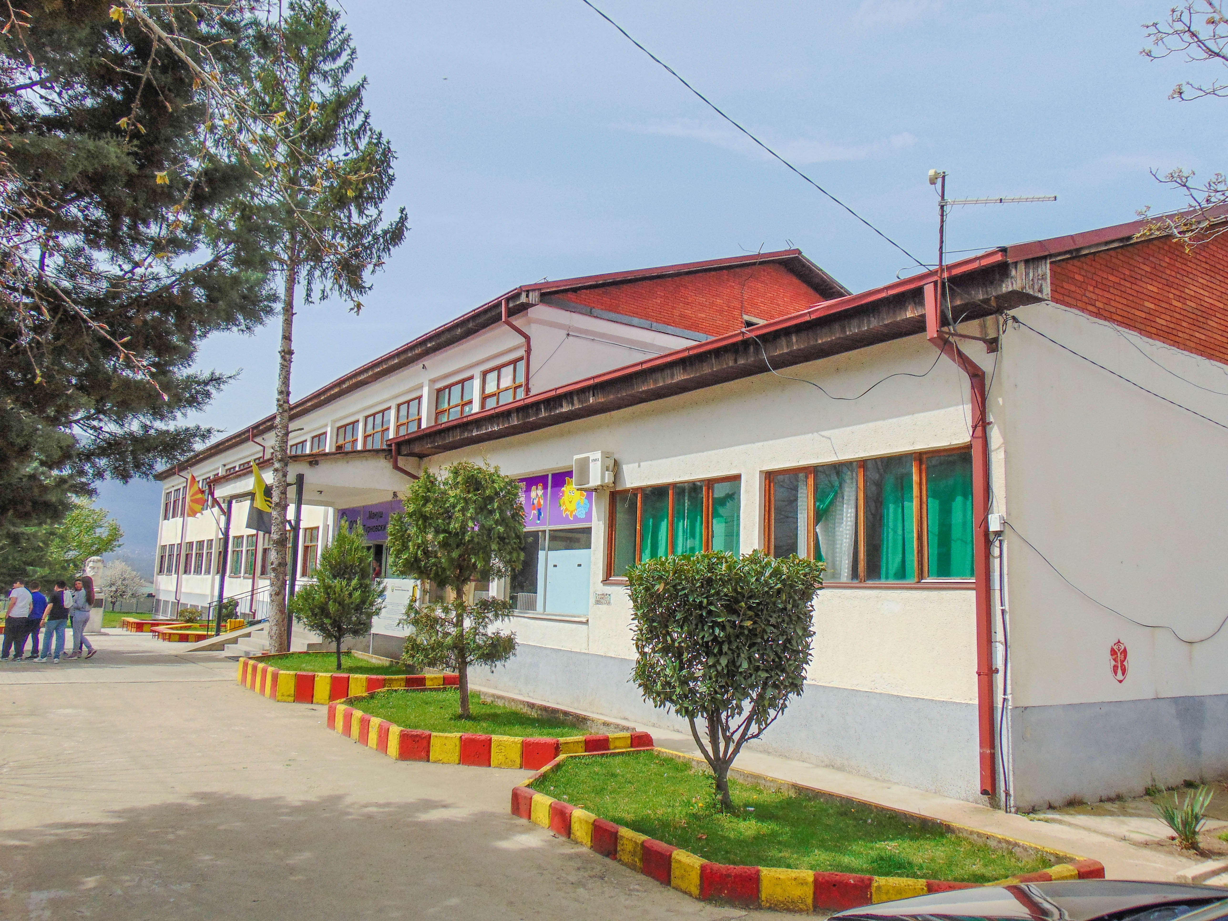 ОУ „Мануш Турновски“ - Ново Село